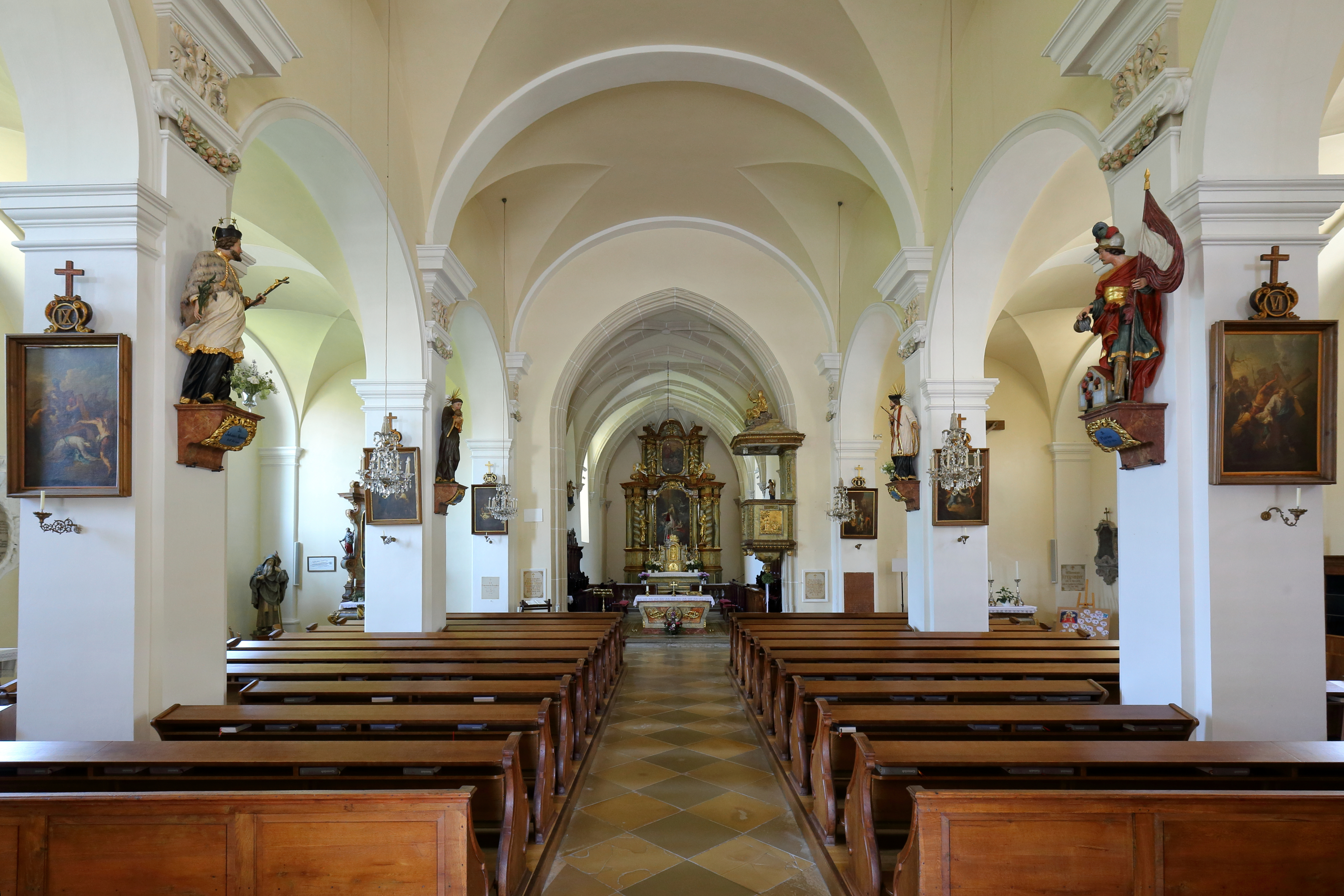 Innenansicht der römisch-katholischen Pfarrkirche hl. Stefan in der niederösterreichischen Stadt Mautern an der Donau.Die Kirche wurde in der zweiten Hälfte des 14. Jahrhunderts errichtet. In den Jahren 1695/96 baute Carlo Antonio Carlone das Langhaus innen um und barockisierte es.